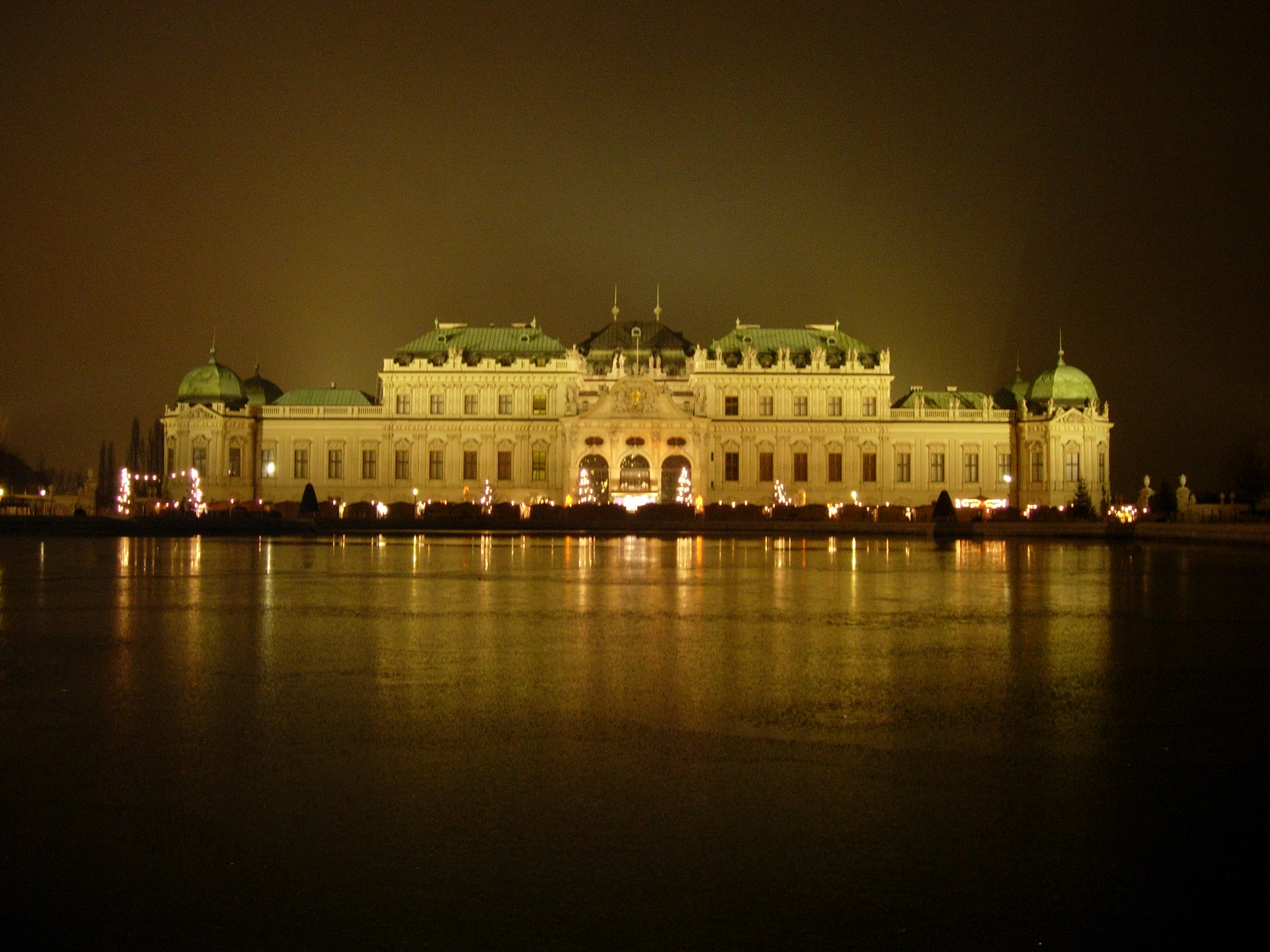 Schloss Belvedere - Wien; Verwenden fuer Schlösser, Wien, Sehenswürdigkeiten